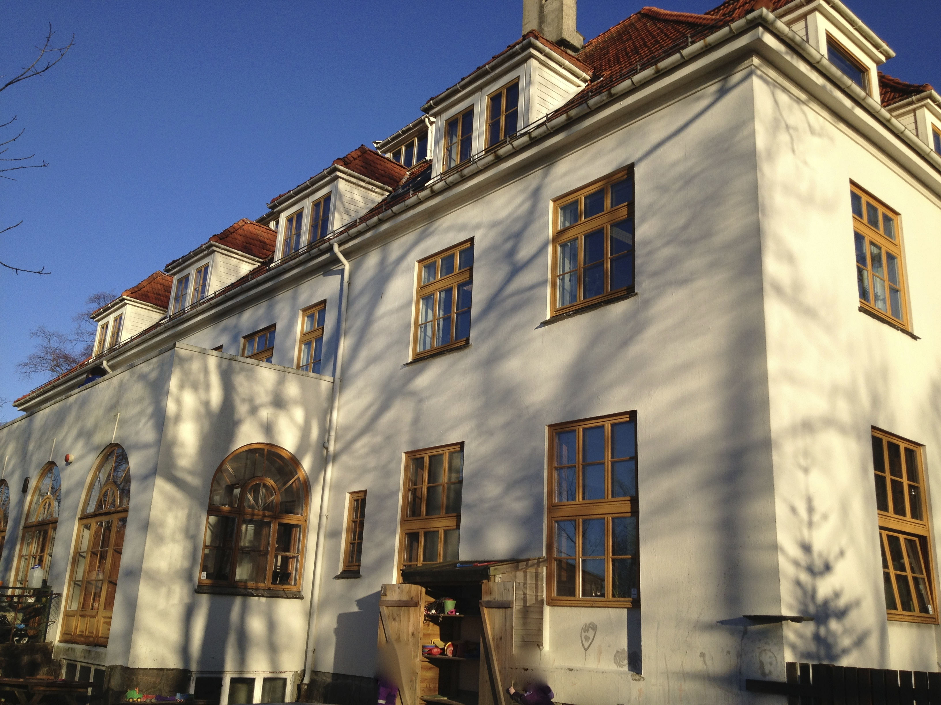 Barnehjemmets vestside.